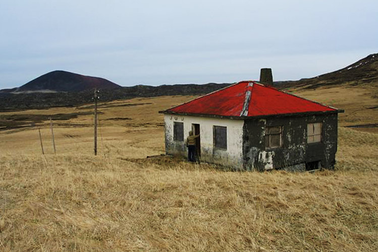 Eyðibýli - Hraunsfjörður á Snæfellsnesi 9. apríl 2004 - þessi mynd er tekin af mér (is:notandi:oliagust)